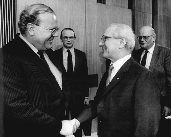 ADN-ZB Mittelstädt-17.3.86-kb Berlin: Gespräch-Der Generalsekretär des ZK der SED und Vorsitzende des Staatsrates der DDR, Erich Honecker, empfing BRD-Wirtschaftsminister Martin Bangemann (l.) zu einem Gespräch.